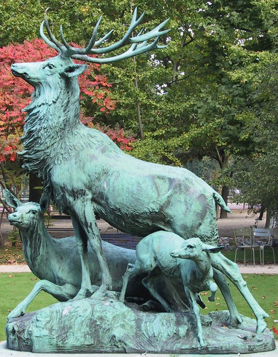 Description: Paris - Jardin du Luxembourg - Statue cerf daim biche Prise de vue: Octobre 2002 Auteur: Licence:CC-BY-SA FR 2.0